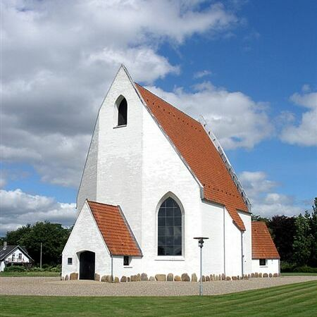 Brejning Kirke Vejle Kommune, Jylland, Denmark